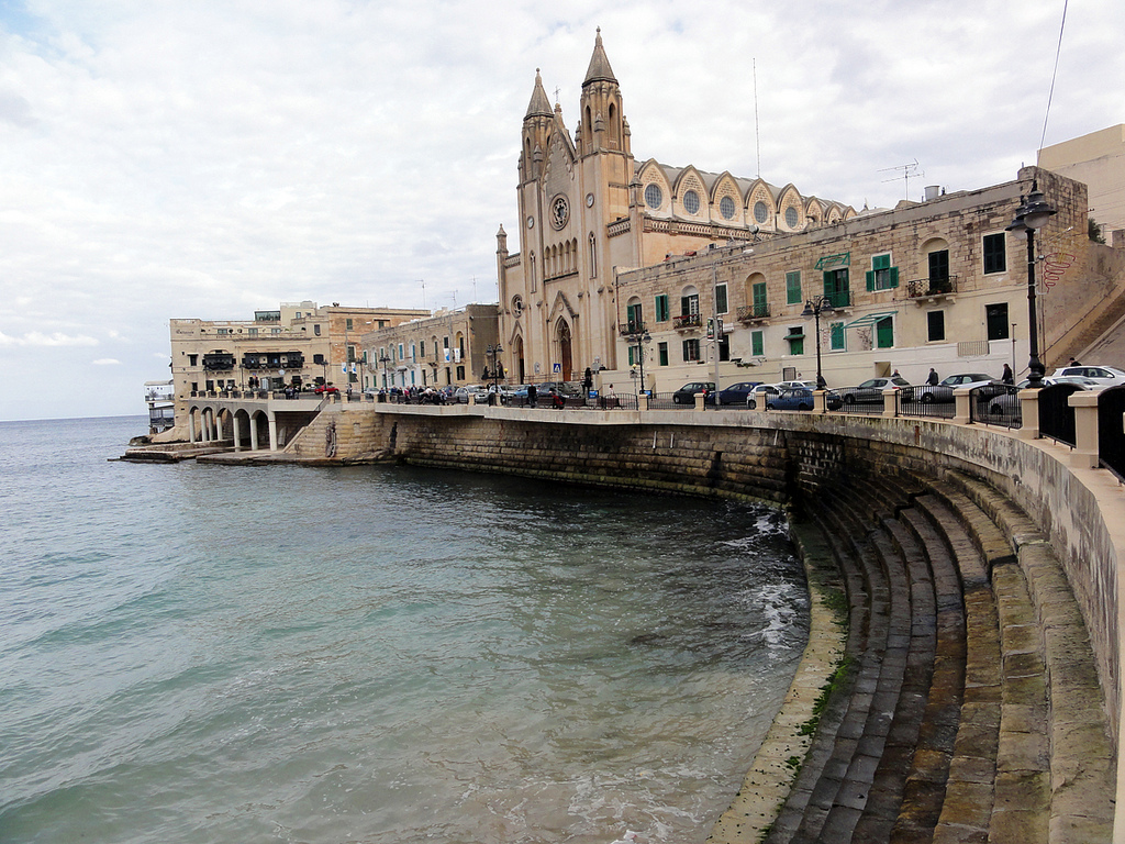 Balluta Bay, Malta